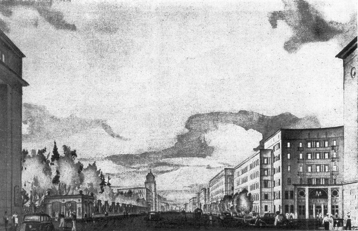 Проект реконструкции ул. Стачек. Изображение варианта наземного вестибюля станции «Сад 9 января» (арх. В. Сугоняев, проект 1940 г.) Сугоняев Валентин Петрович умер в 1943 году в блокадном Ленинграде.